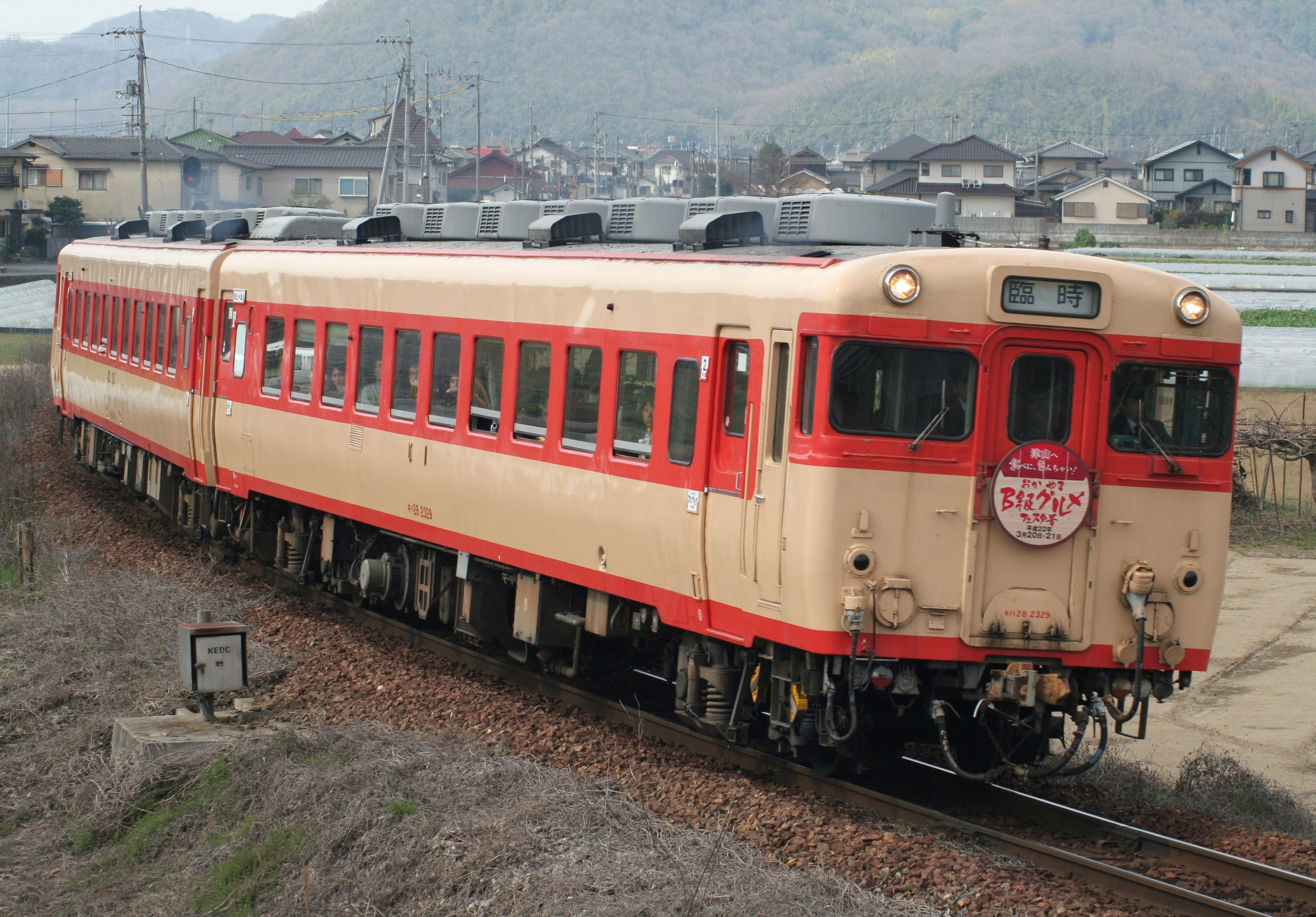 JR西日本キハ58系気動車 キハ28-2329＋キハ58-563 B級グルメフェスタ号 津山線、玉柏 - 牧山